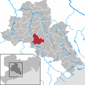 Frankenberg/Sa. in Saxony - district Mittelsachsen